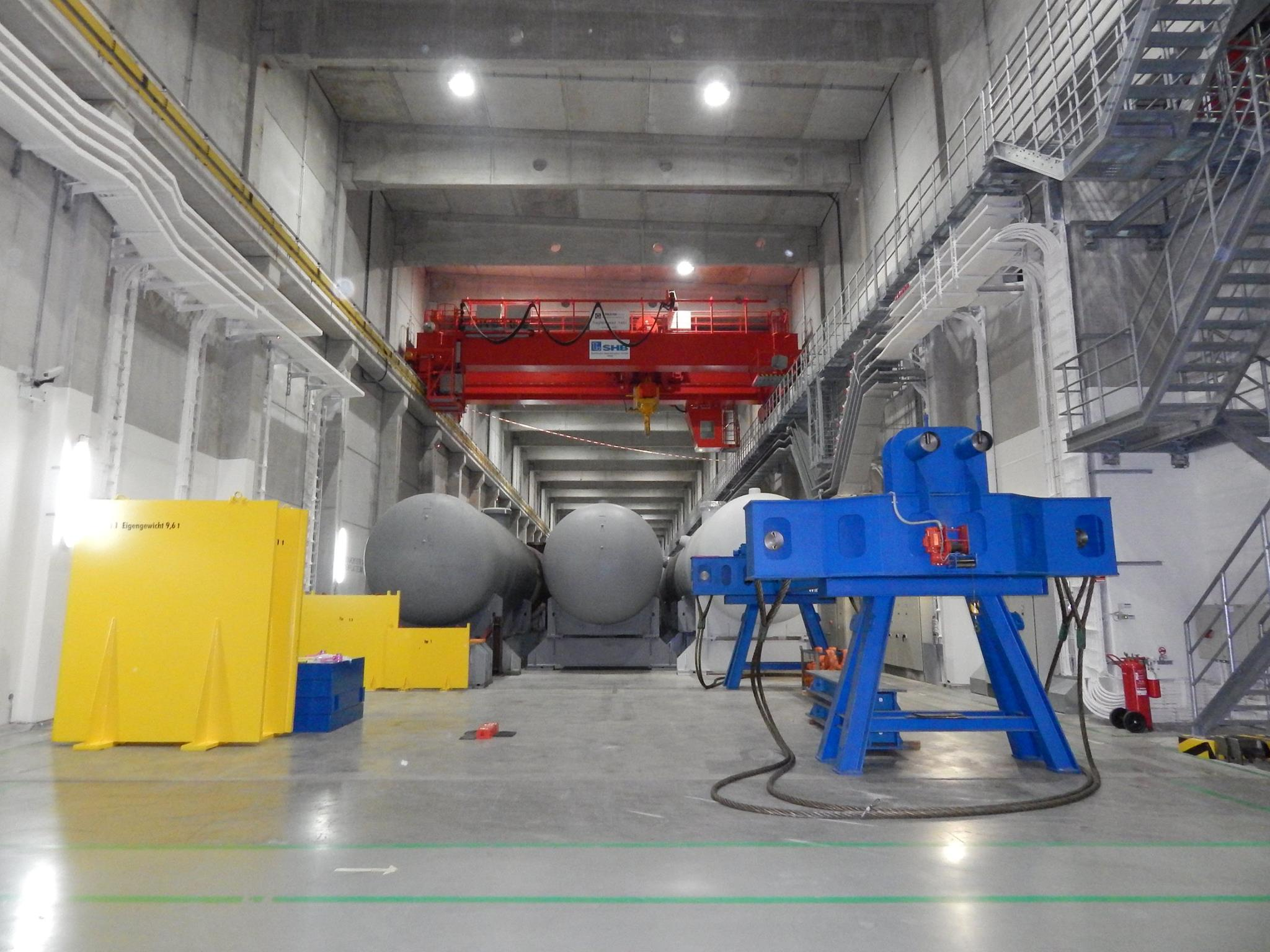 Всі 5 активованих реактори та парогенератори блоків 1-5 зберігаються в тимчасовому сховищі на майданчику АЕС